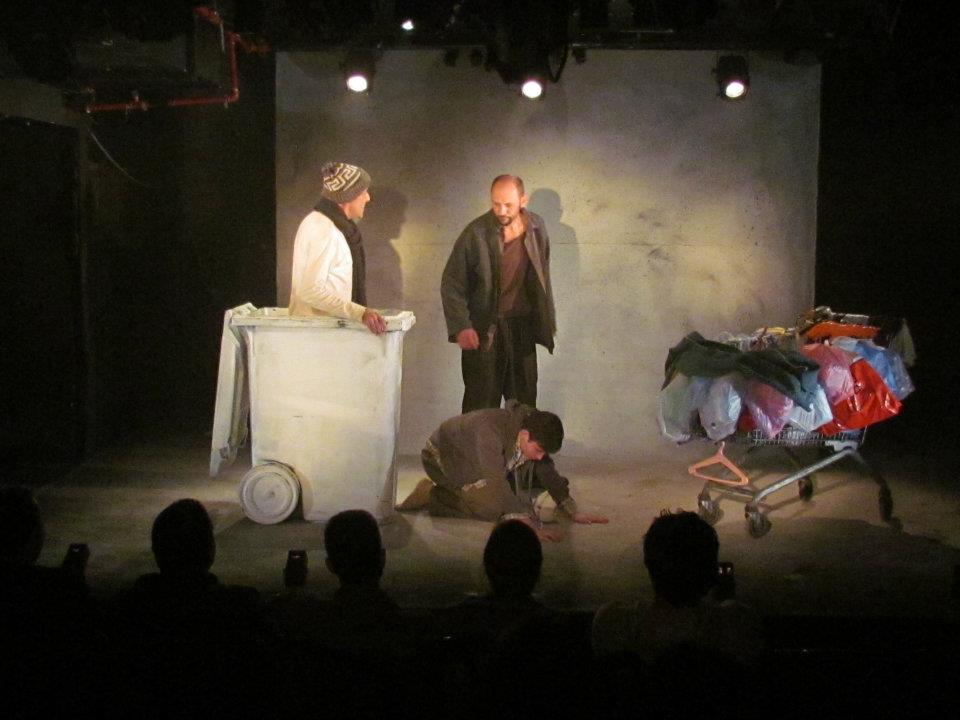 ההצגה "פח" פרי עטו ובבימויו של ירון מוטולה